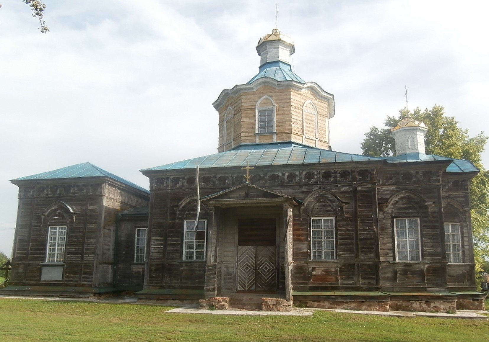 Церква 17 століття